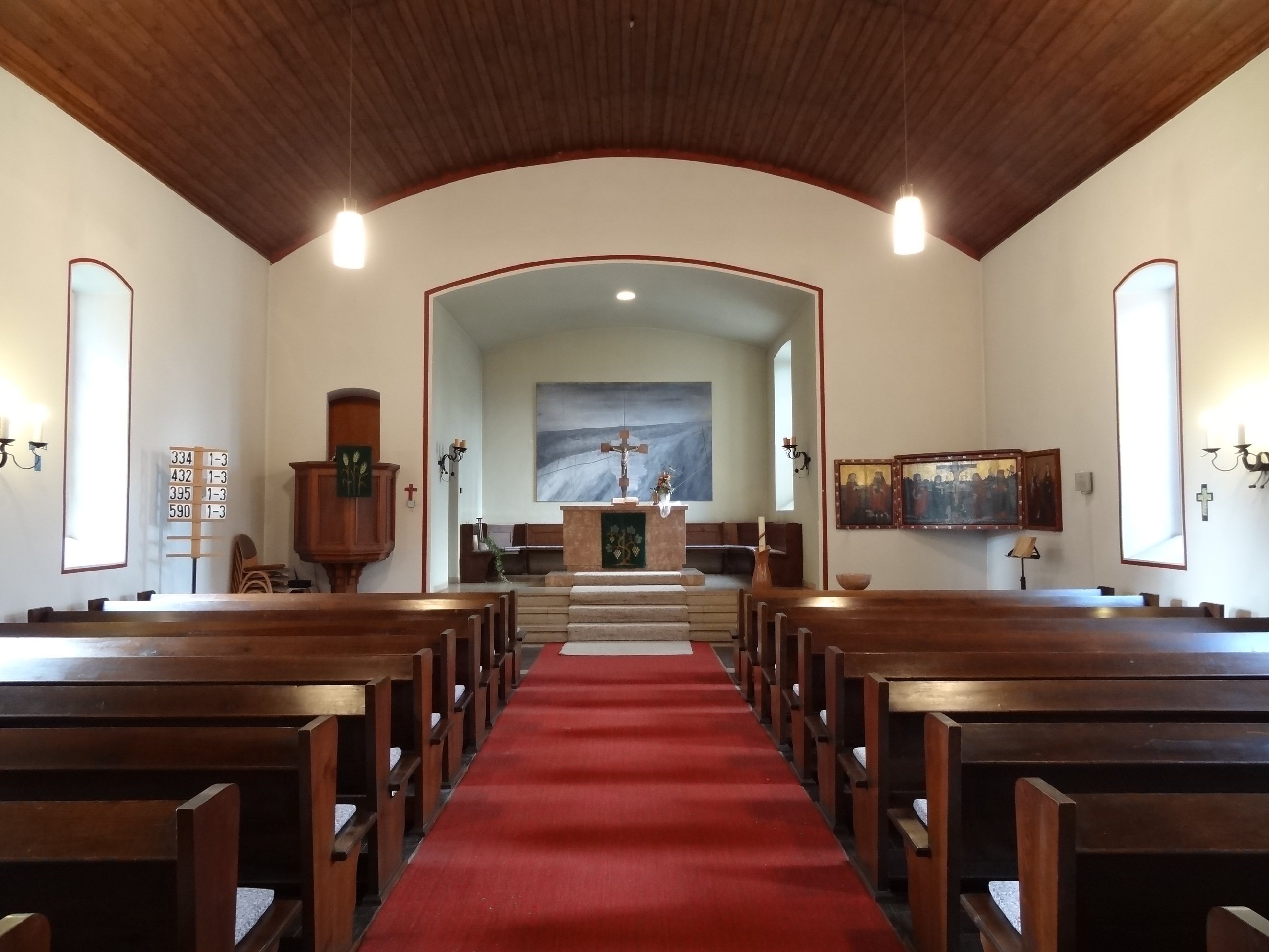 Evangelische Kirche (Hattenrod)Evangelische Kirche (Hattenrod)